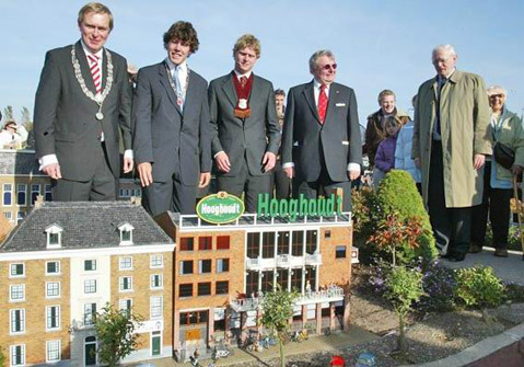 Mutua Fides geopend in Madurodam